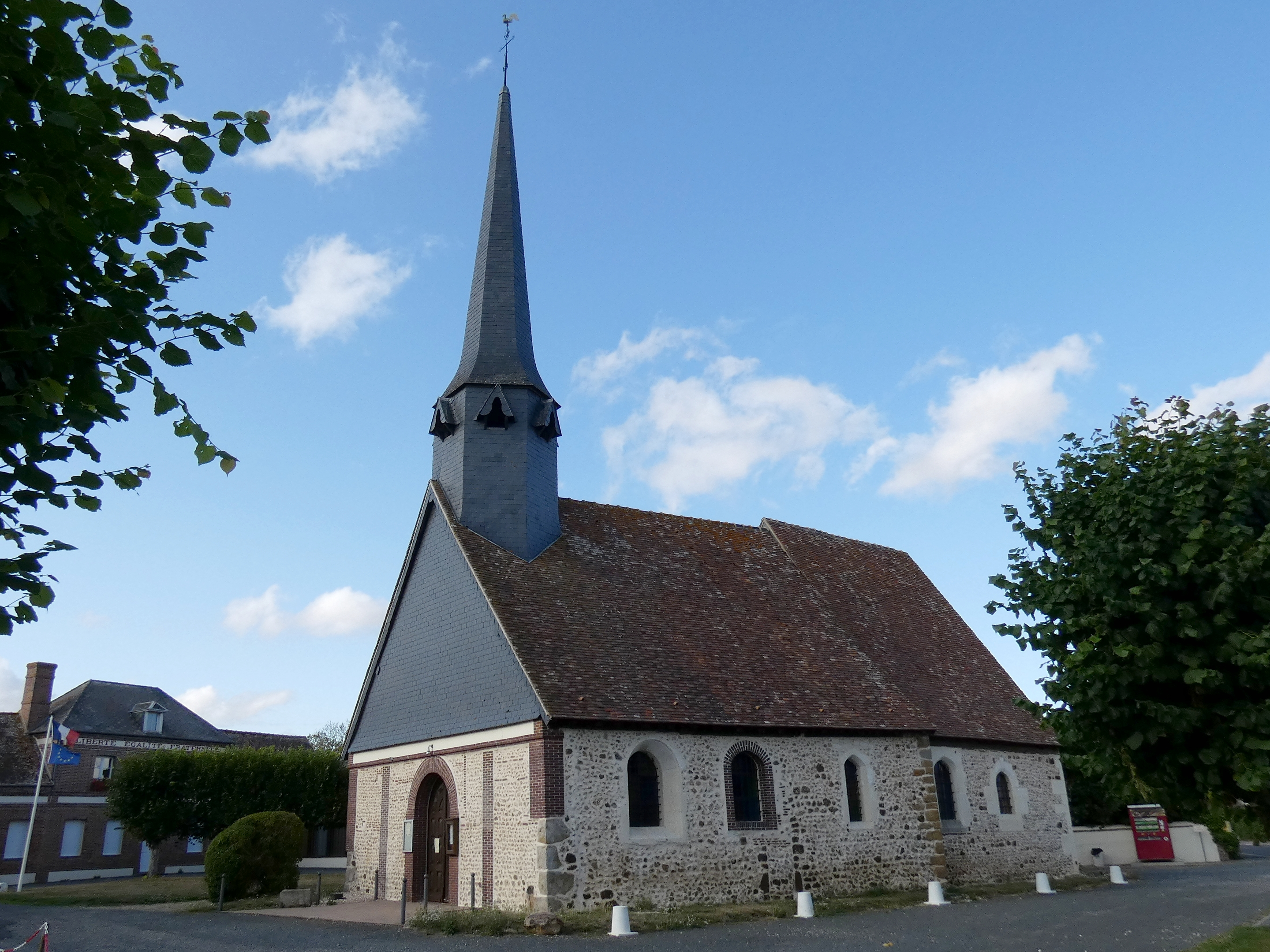 Piseux (Normandie, France). L'église Saint-Denis.